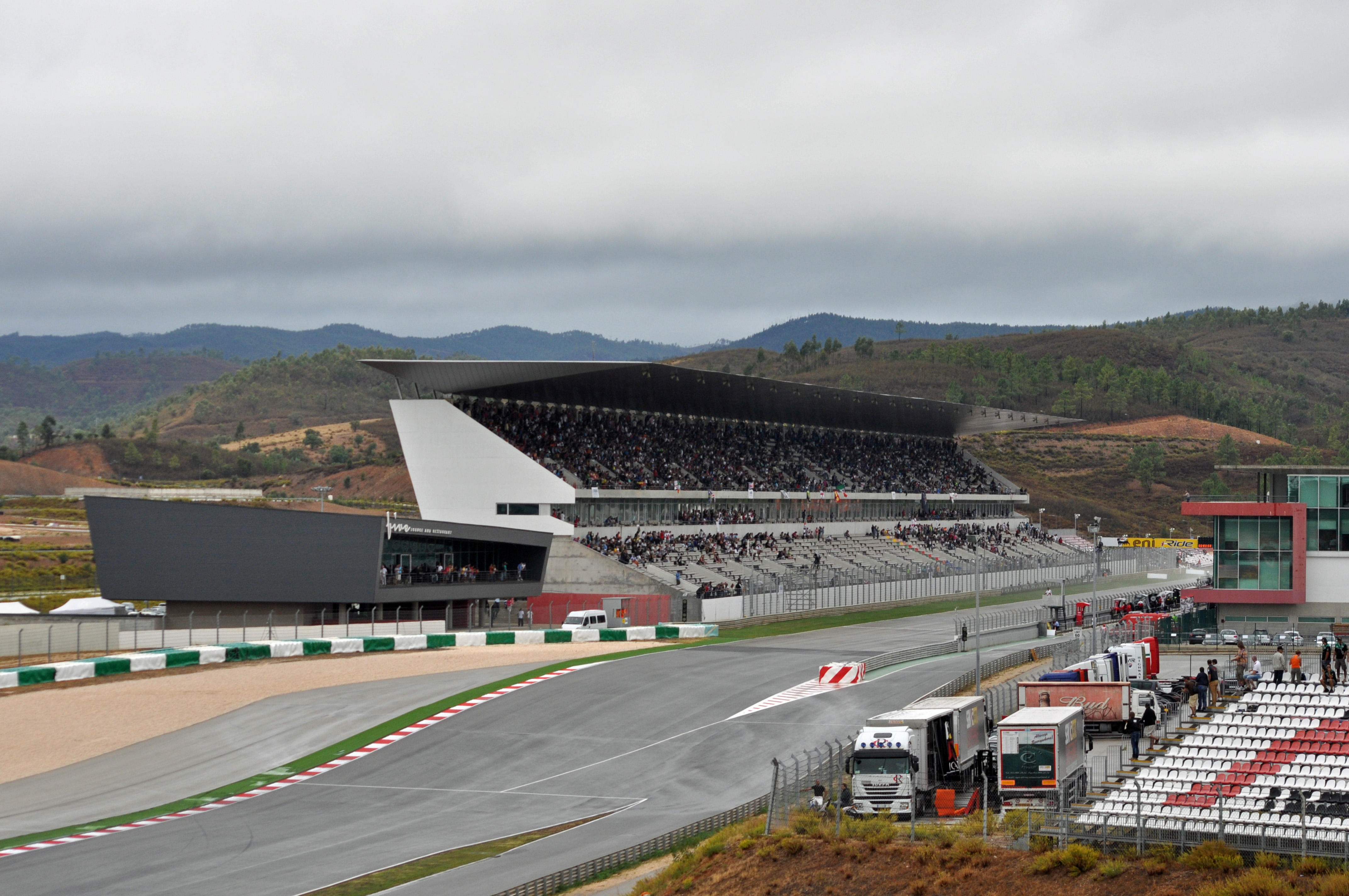 Autódromo Internacional do Algarve (2012-09-23), by Klugschnacker in Wikipedia (25)